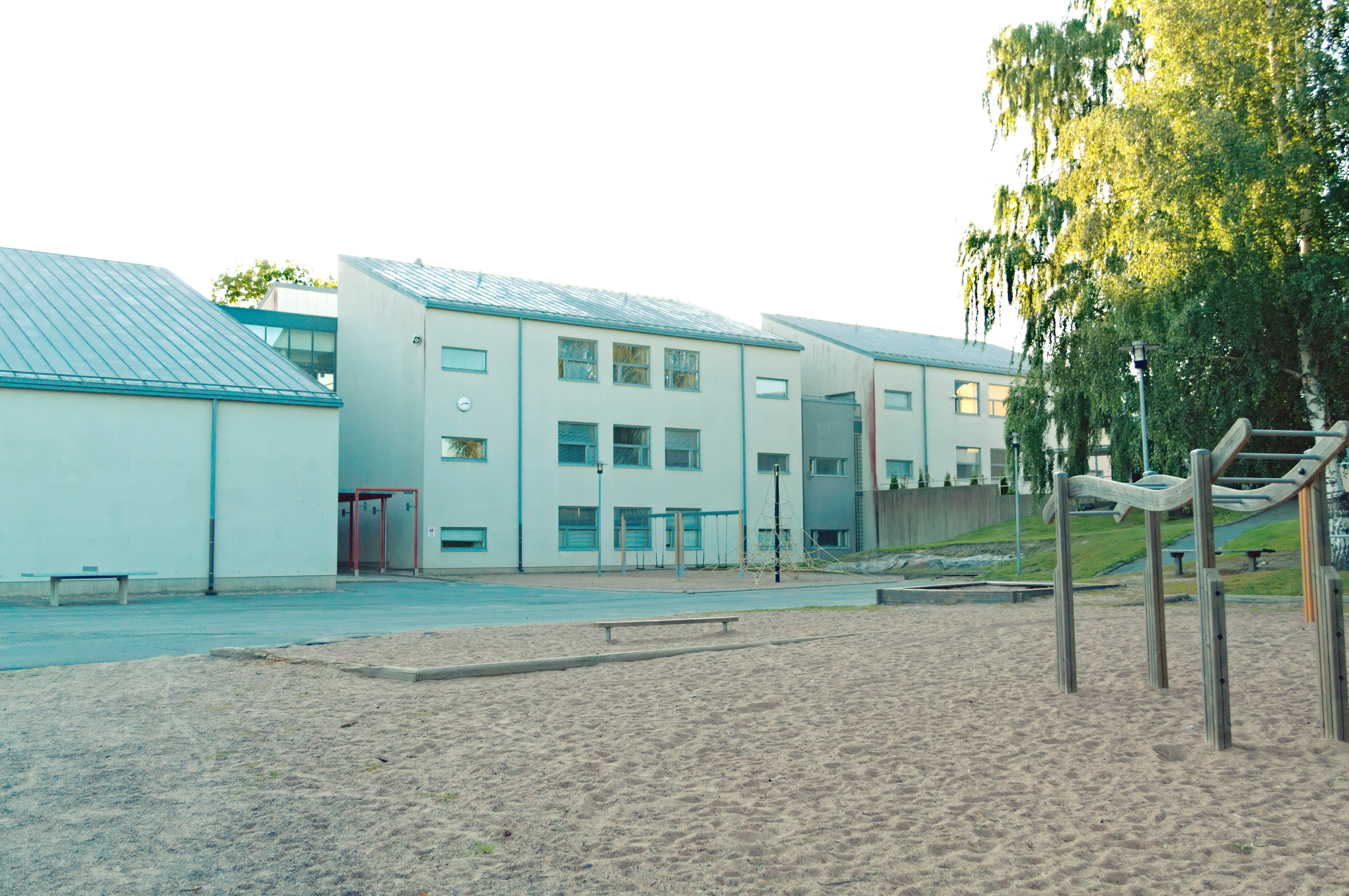 Rauman normaalikoulu